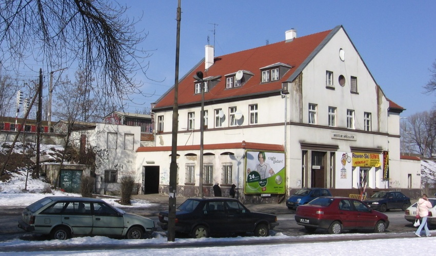 Wrocław, Poland - railway station Wrocław-Mikołajów